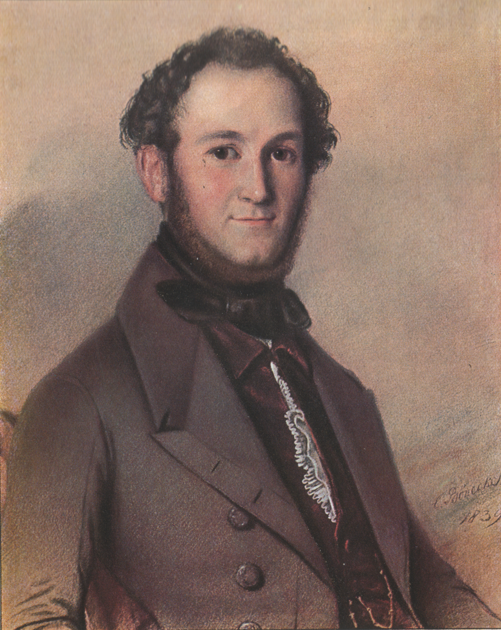 Rudolph Hertzog, Agenda 1914. Jahreskalender des Berliner Kaufhauses. Vorsatzblatt. Bildunterschrift: Rudolph Hertzog, geb. 15.6.1815. Leinen, 19,5 x 28,5 cm